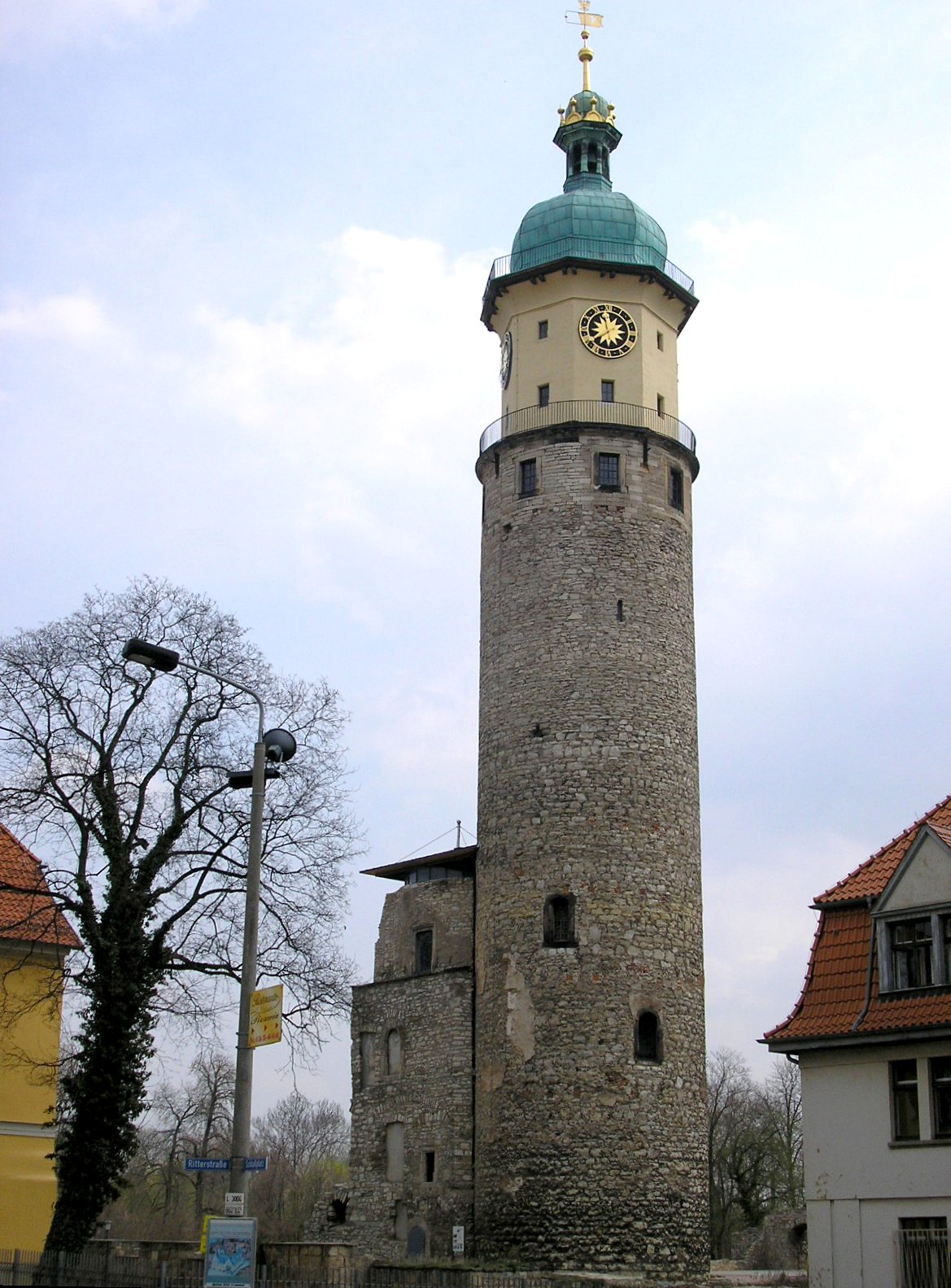 Neideckturm in Arnstadt (Thüringen).